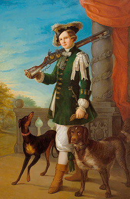 Junger höfischer Jäger mit geschultertem Radschlossgewehr in Begleitung zweier Jagdhunde.